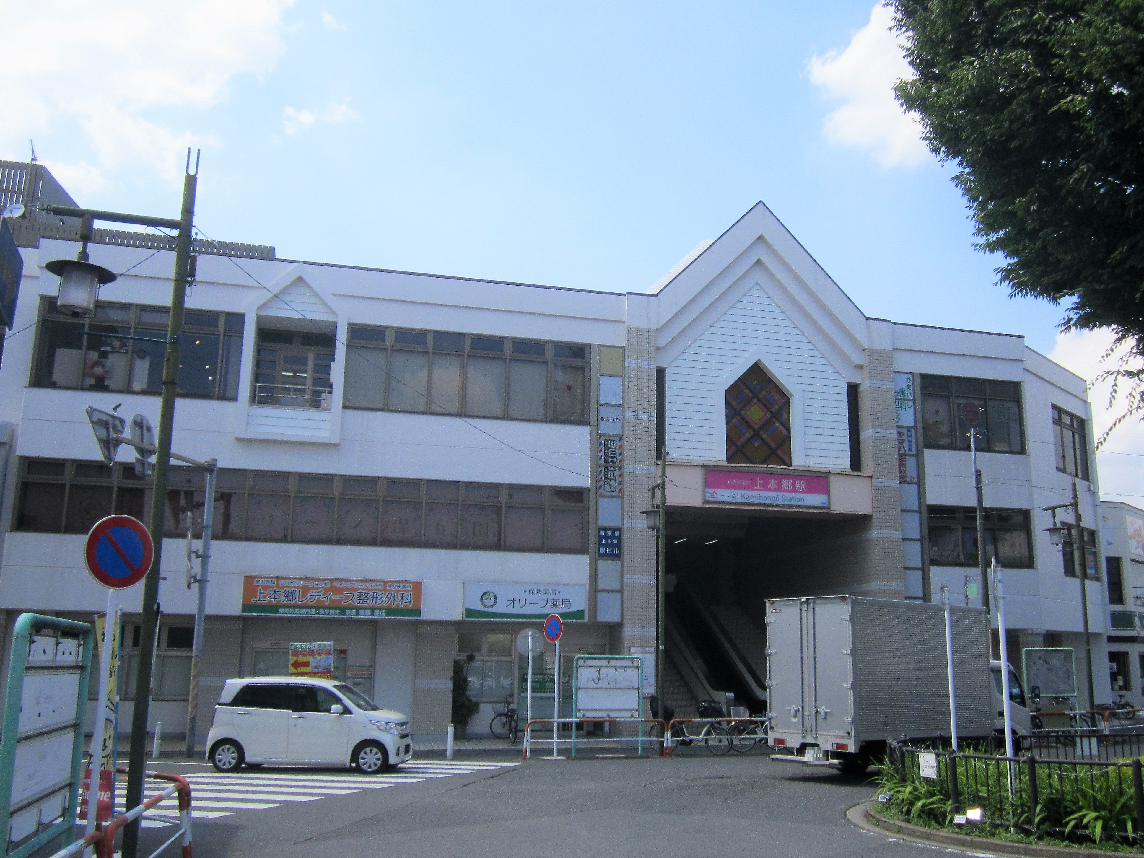 上本郷駅南口（2020年6月） Canon PowerShot A2200